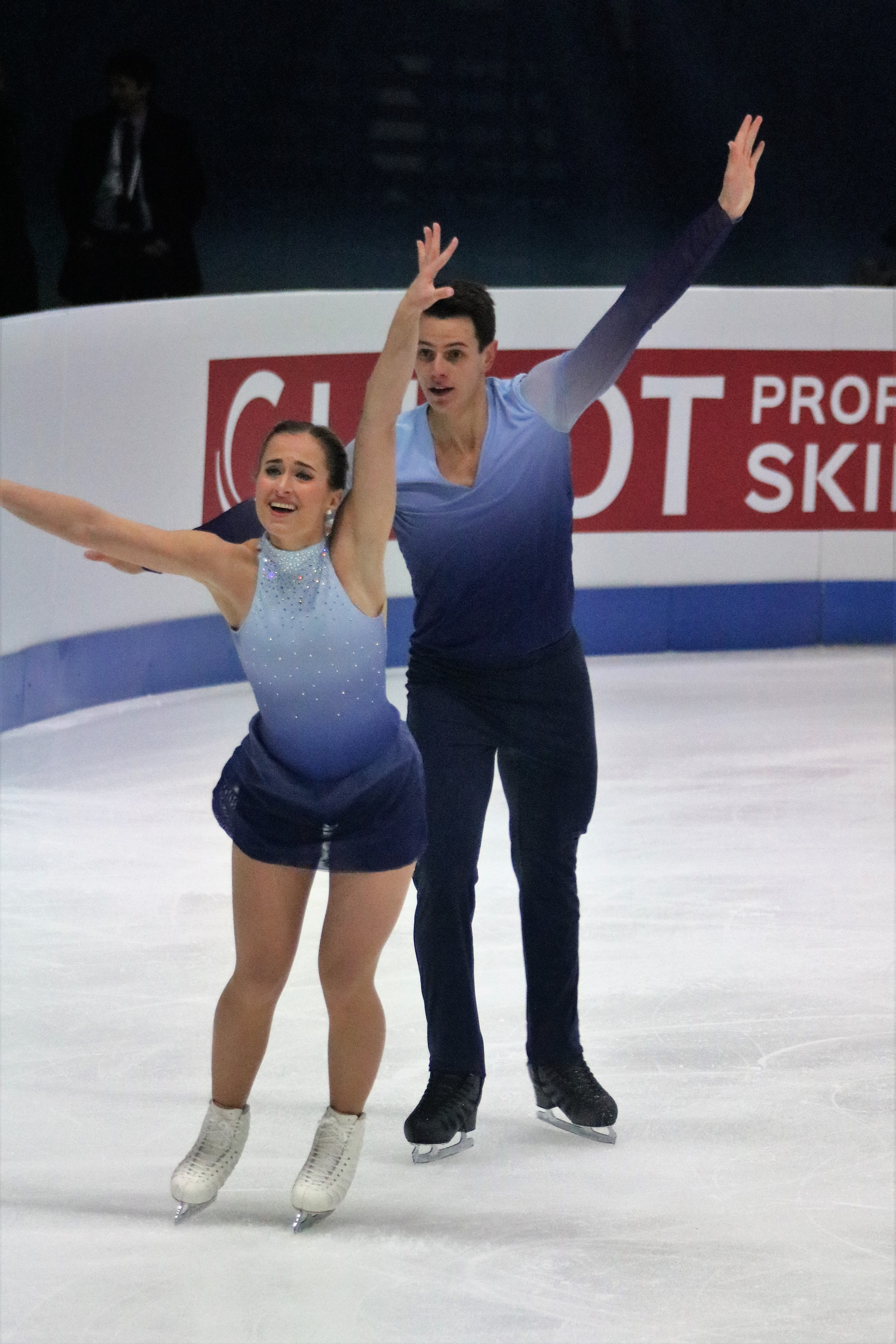 Александра Хербрикова / Николас Руле (Швейцария) на чемпионате Европы по фигурному катанию 2020